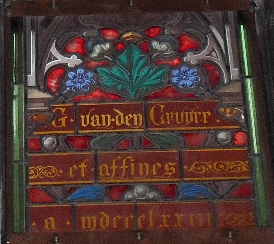 fragment van glasraam in Sint-Josef kapel van O.L.V.kathedraal Antwerpen